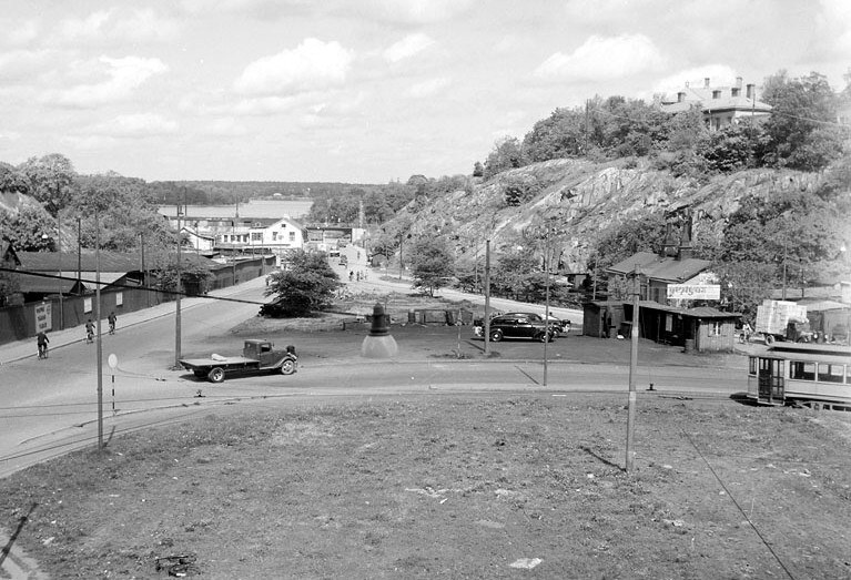 Roslagsplan i Stockholm 1945 (bilden är beskuren)